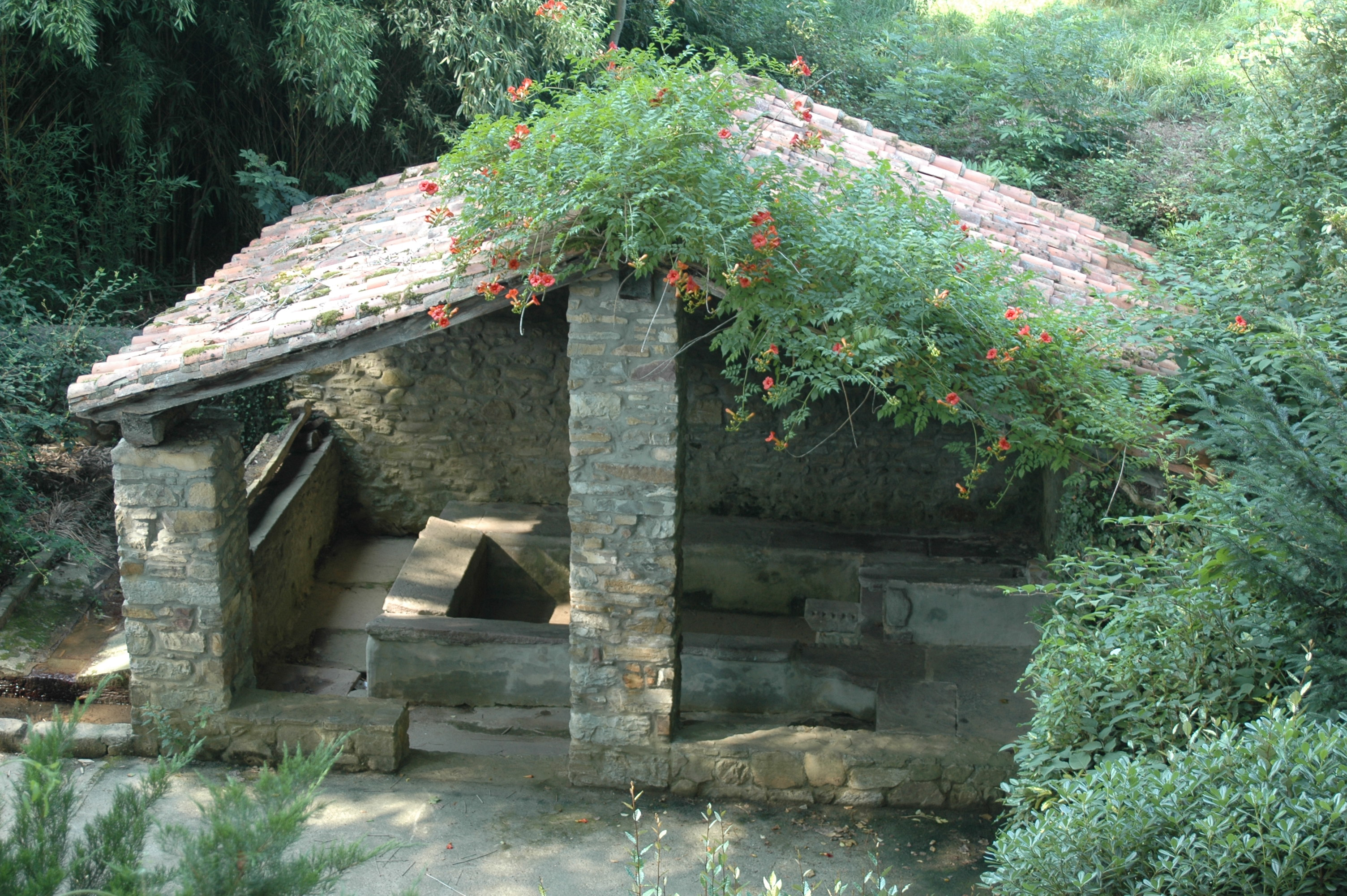 Ainhoa, le lavoir, photo prise le 08/07/2006 par Harrieta171